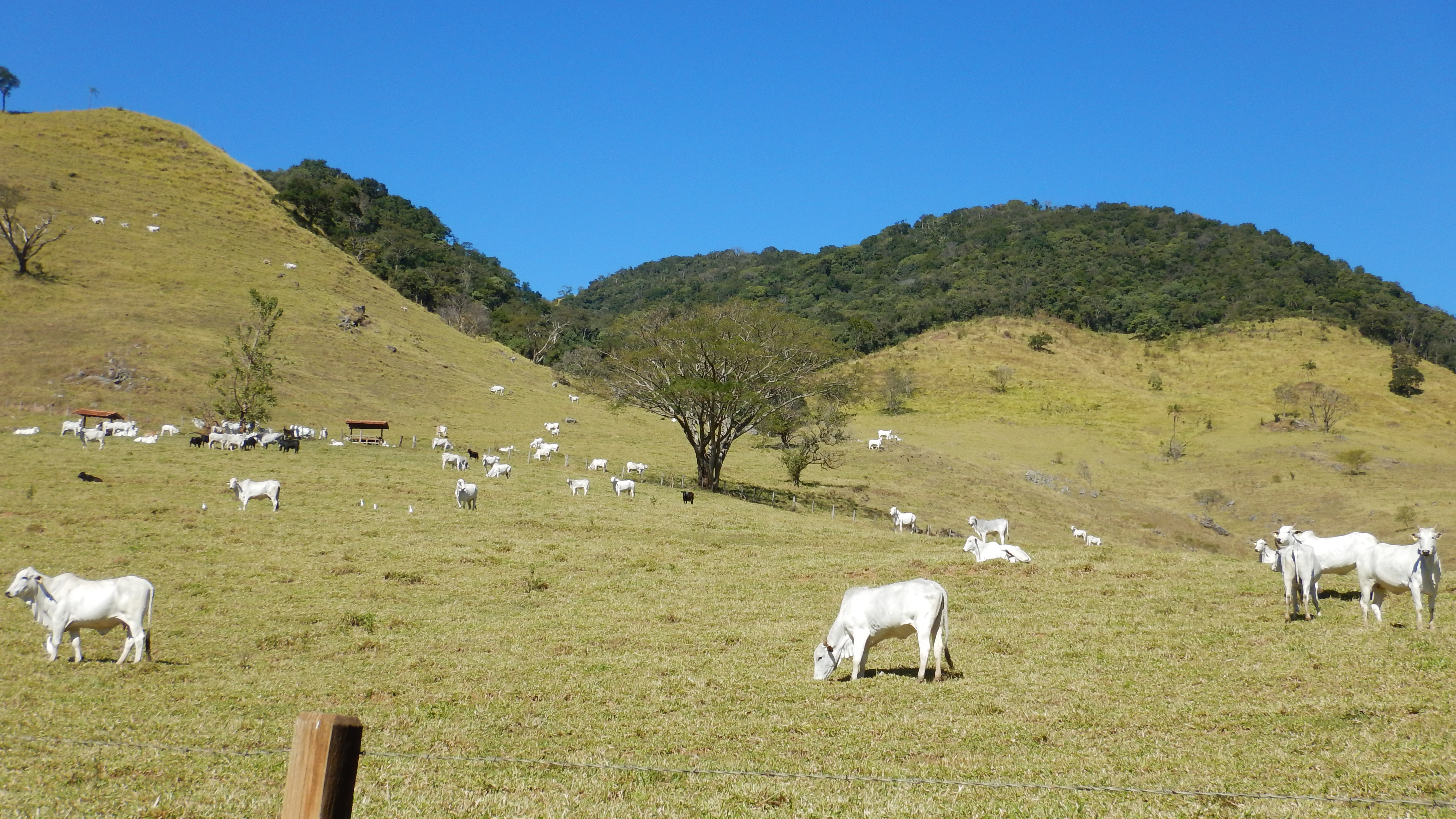 estrada rural 2016-07-03